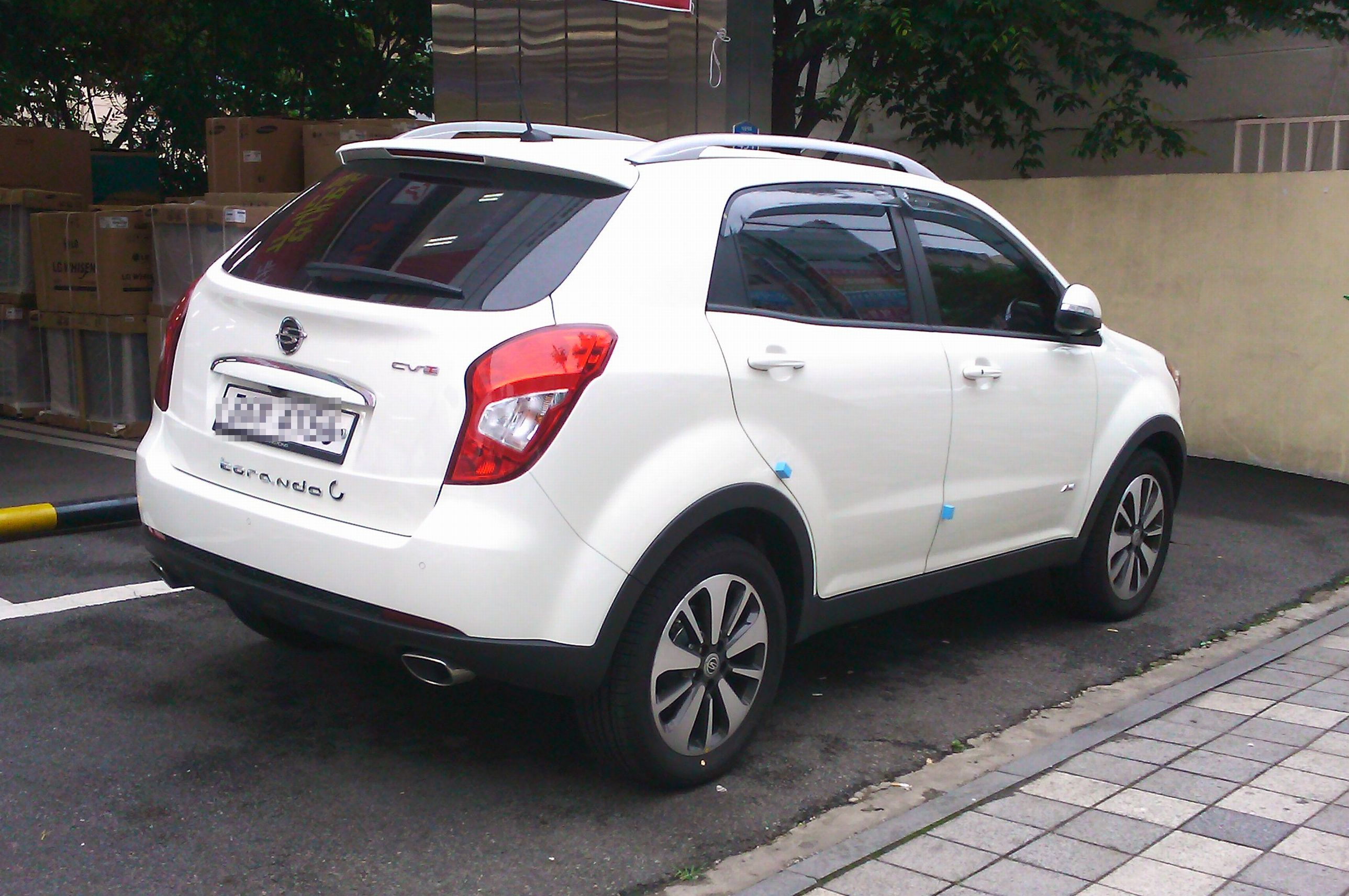 サンヨン・コランド